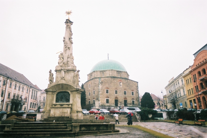 march 2006, main square in Pécs